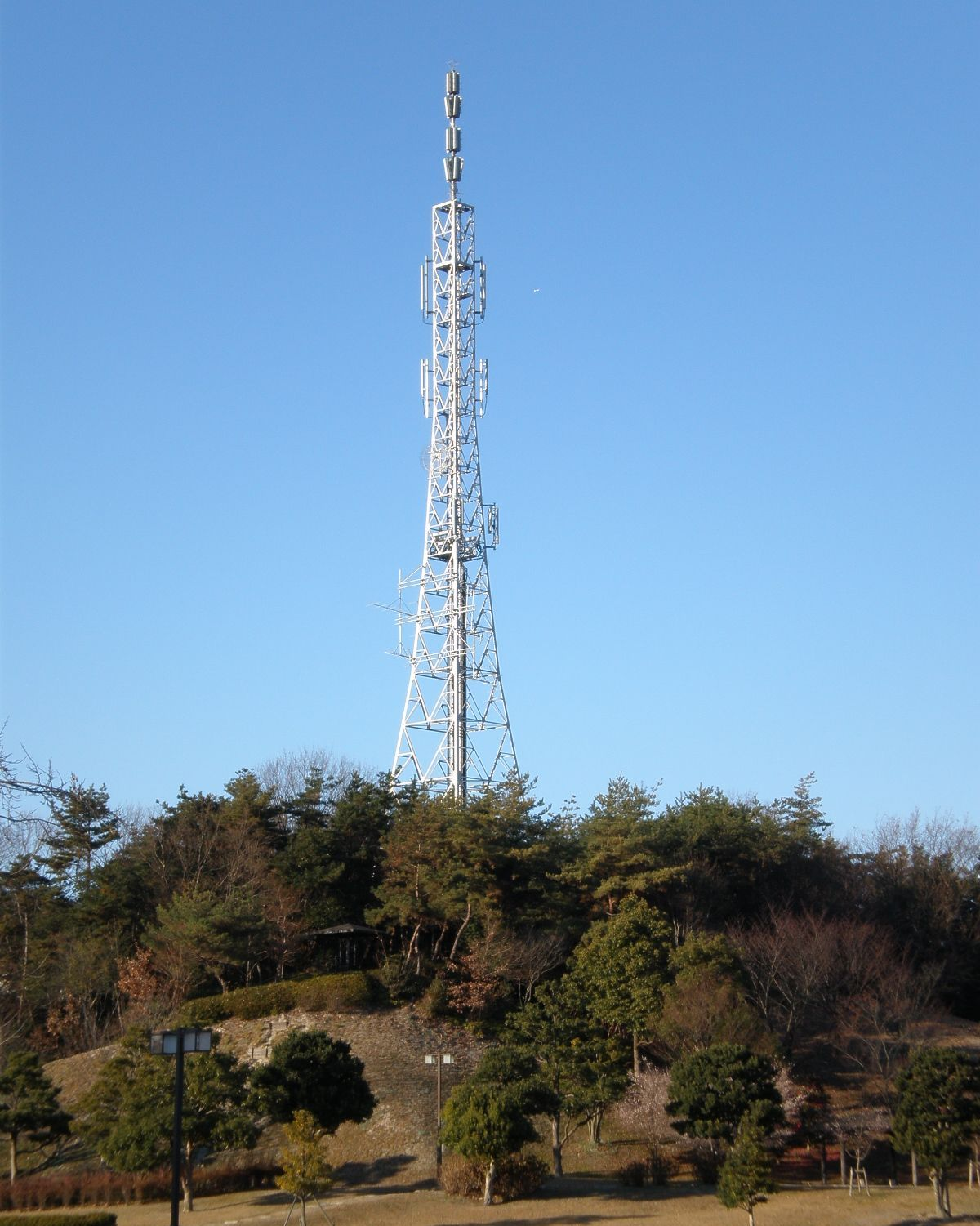 愛知県小牧市にある小牧桃花台テレビ中継局